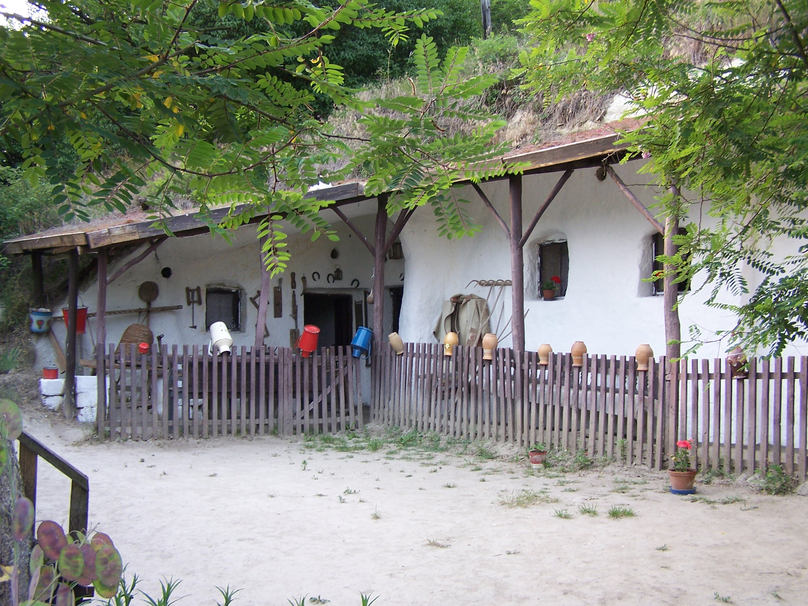 Barlanglakás (Cserépváralja, Dobó u. 4.) This is a photo of a monument in Hungary. Identifier: 2713